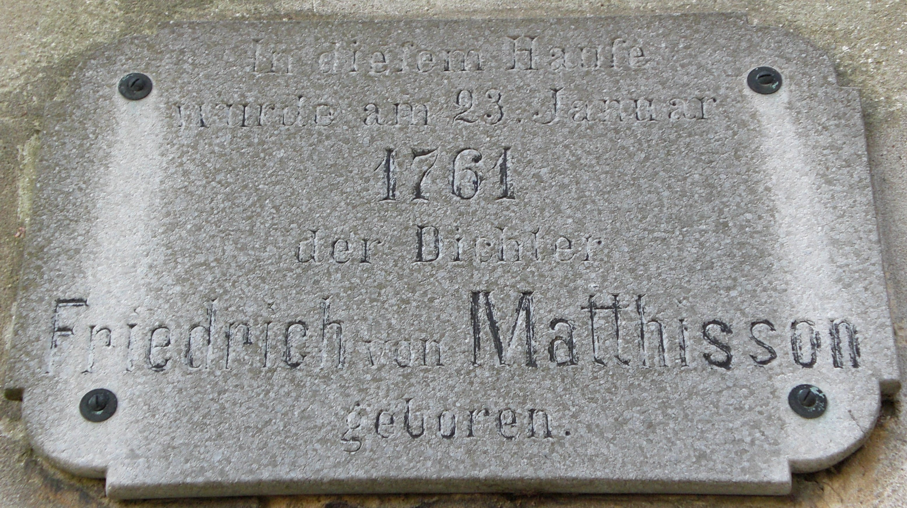 Gedenktafel für Matthison am Pfarrhaus der St.-Peter-Kirche in Hohendodeleben, Sachsen-Anhalt